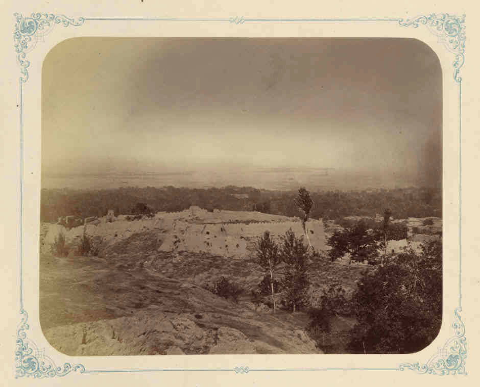 Развалины цитадели Ургута